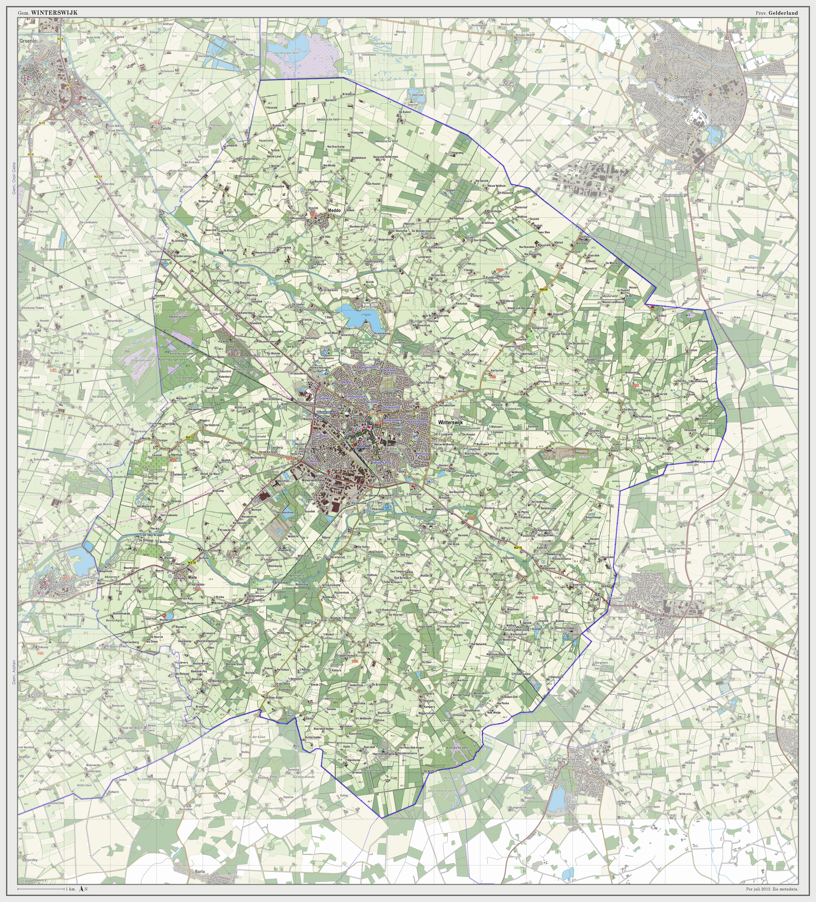 Topografische kaart van gemeente Winterswijk (2013). Samengesteld door Jan-Willem van Aalst op basis van de GML open geodata van de BRT/Top10NL (basisregistratie Topografie, Kadaster 2011), vrijgegeven door Kadaster onder de Creative Commons BY licentie. Additionele gegevens uit BAG (8 juli 2013), uit de Open Street Map (9 juli 2013) en uit de Risicokaart. Peildatum kaartbeeld: 9 juli 2013. Zie ook Gemeentenatlas.nl Samenstelling en kleurenschema: Jan-Willem van Aalst, met QuantumGIS en Photoshop. Zie ook de Legenda.